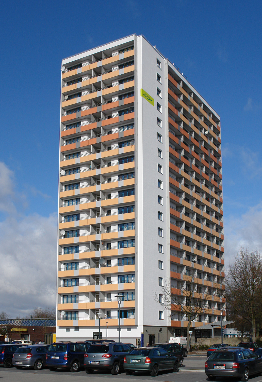 Bremen-Blockdiek: Hochhaus Gelderner Str. 2.